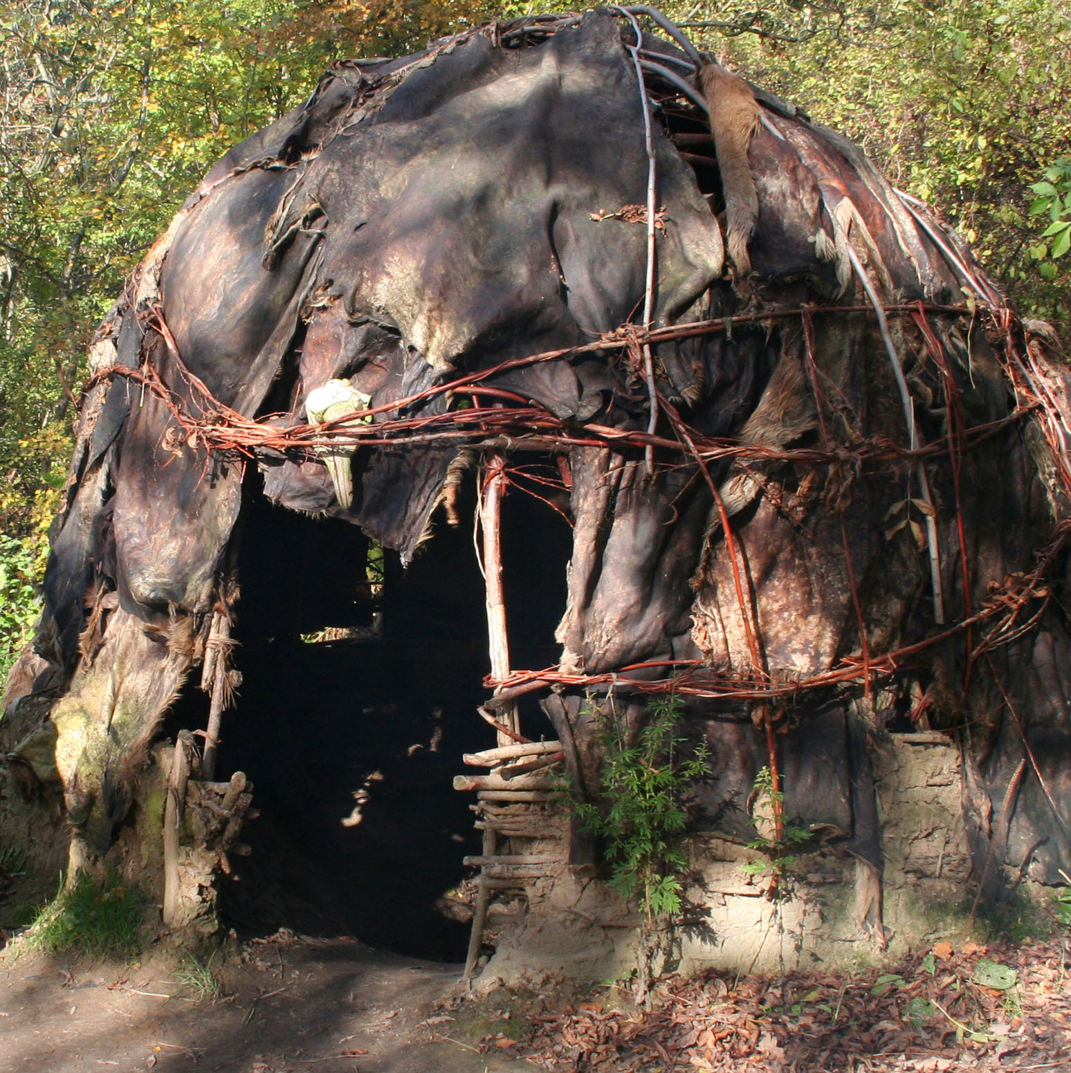 Athra stenalderbopladsen i Lejre Forsøgscenter